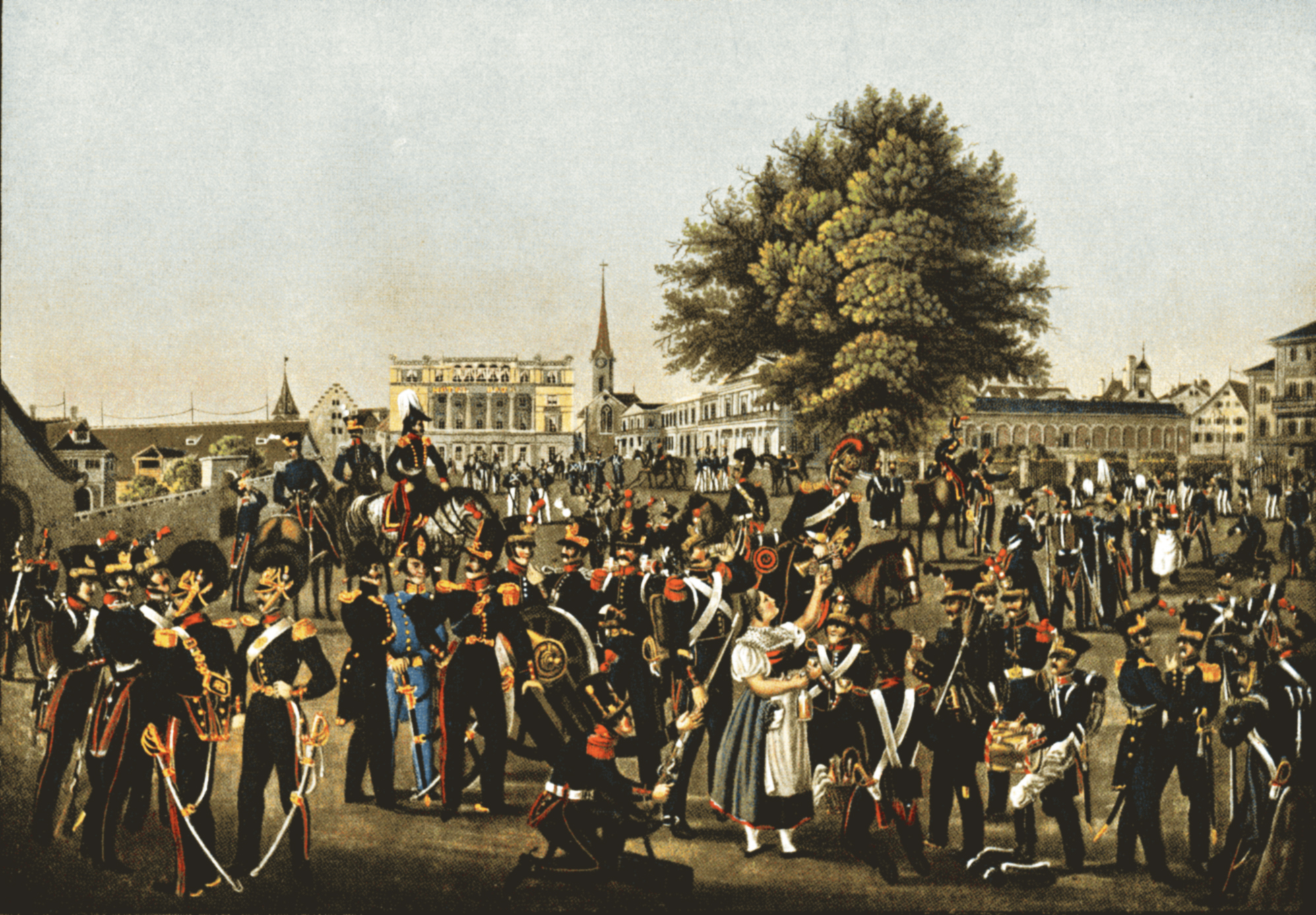 Uniformen der Truppen des Kantons Zürich um 1830. Schauplatz der Szene ist der heutige Paradeplatz in Zürich.